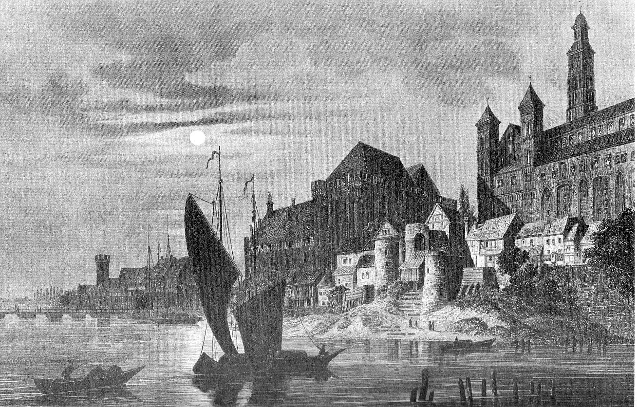 Stahlstich: Ansicht der Marienburg (heute: Malbork, Polen), nach Domenico Quaglio 1834.